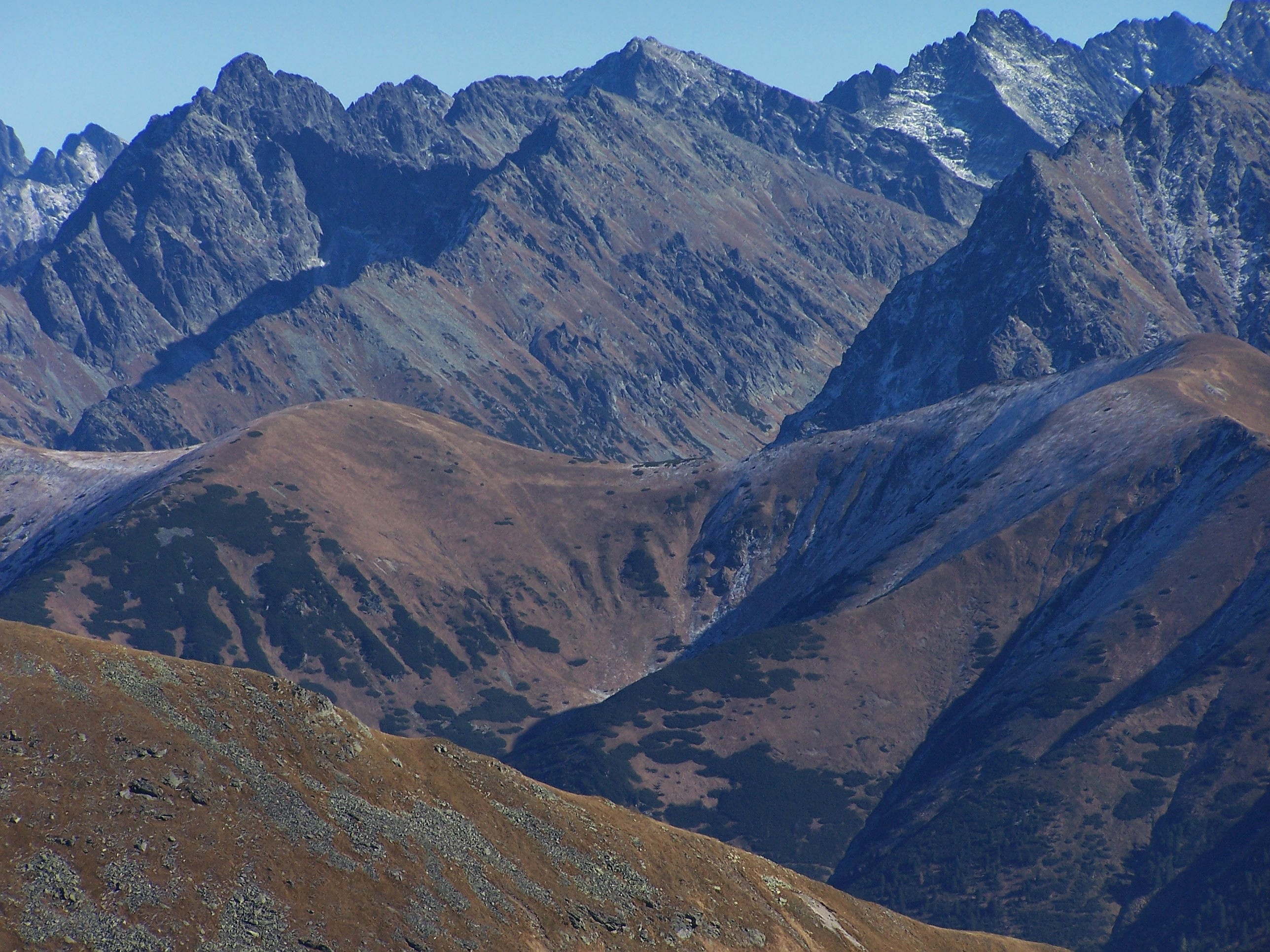 Tatry Wysokie. Widok z Błyszcza